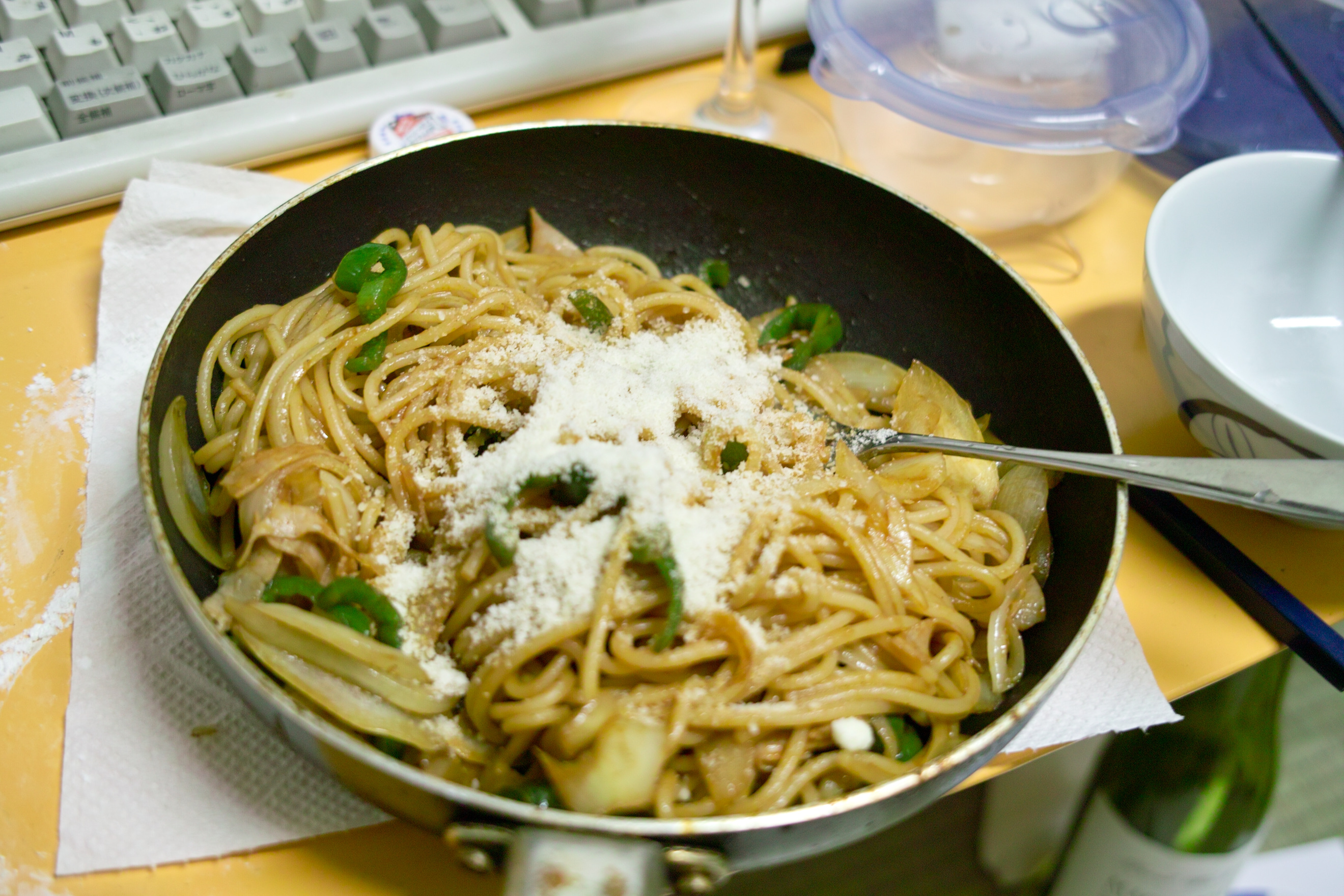 Naporitan